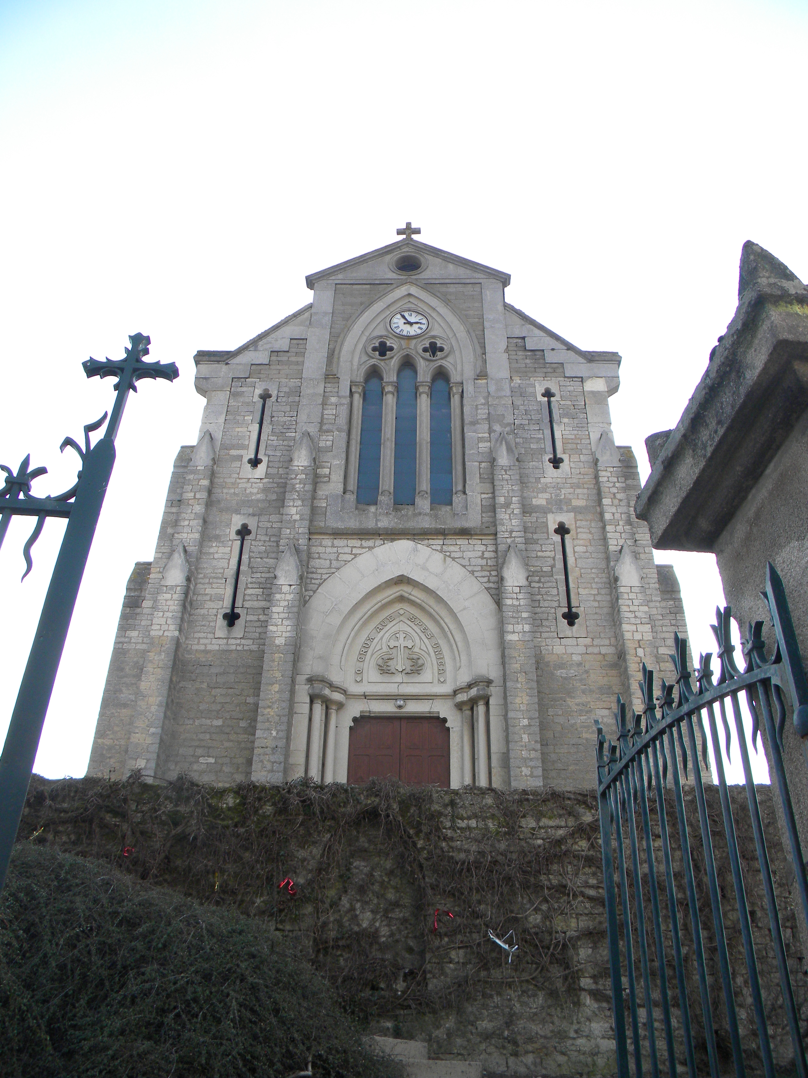 Eglise